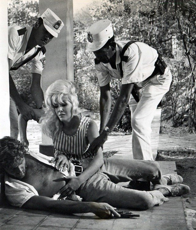 Libertad Leblanc y Guillermo Murray en la película La Venus maldita.